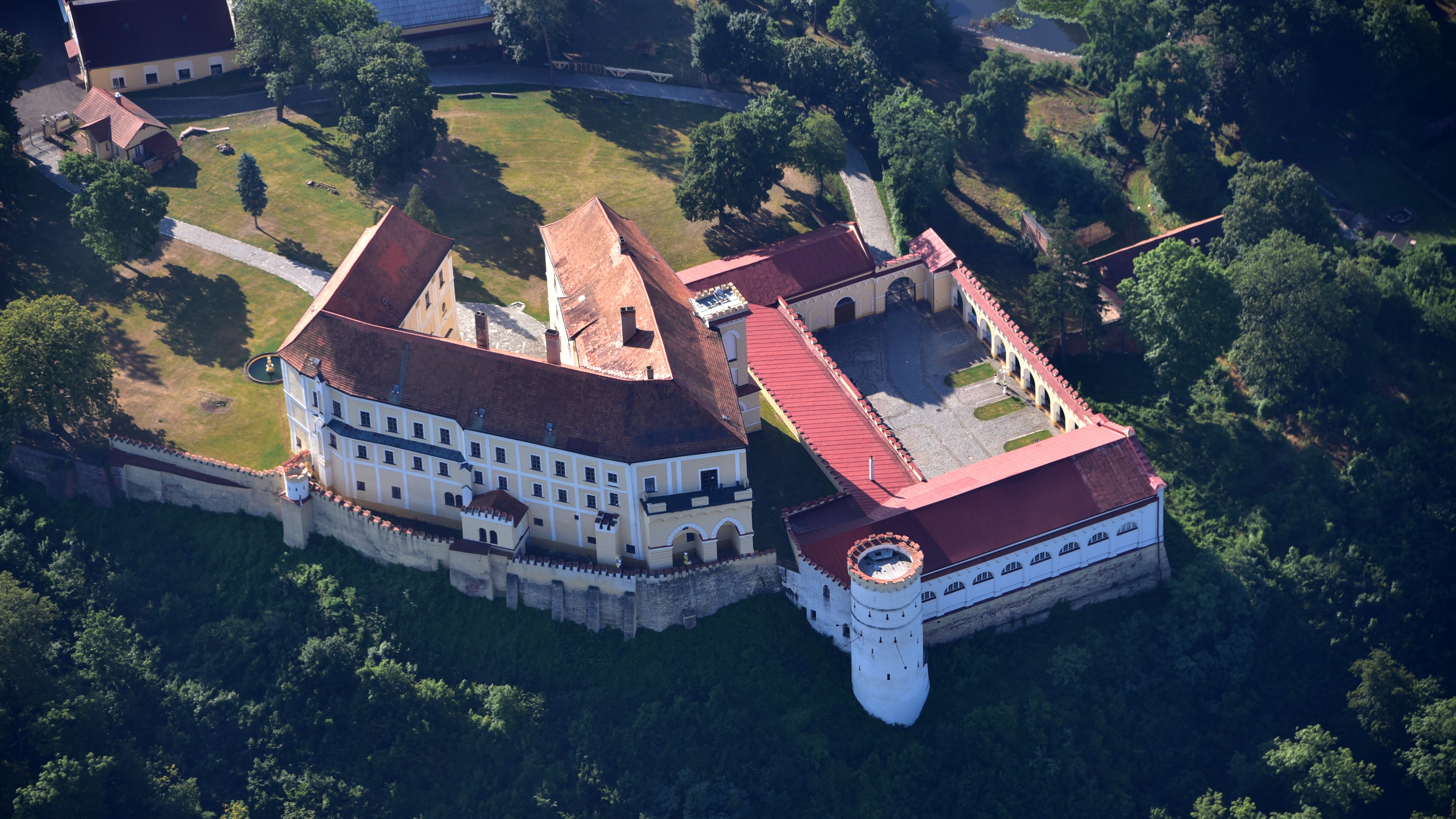 CZ - Schloss Letovice, Luftaufnahme (2018)